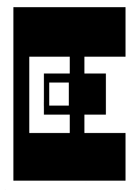 Logotipo de Euskadiko Ezkerra (EE).